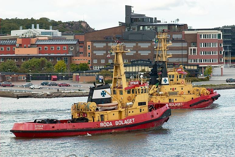 Röda Bolagets bogserare i Göteborgs hamn. Motiv: Göteborgs Kategori: Hamnmiljöer Röda Bolagets bogserare i Göteborgs hamn. Göteborgs.